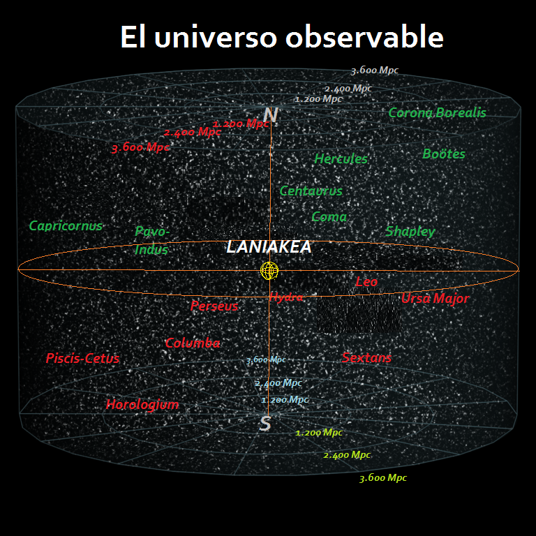 Laniakea: Nuestro supercúmulo local